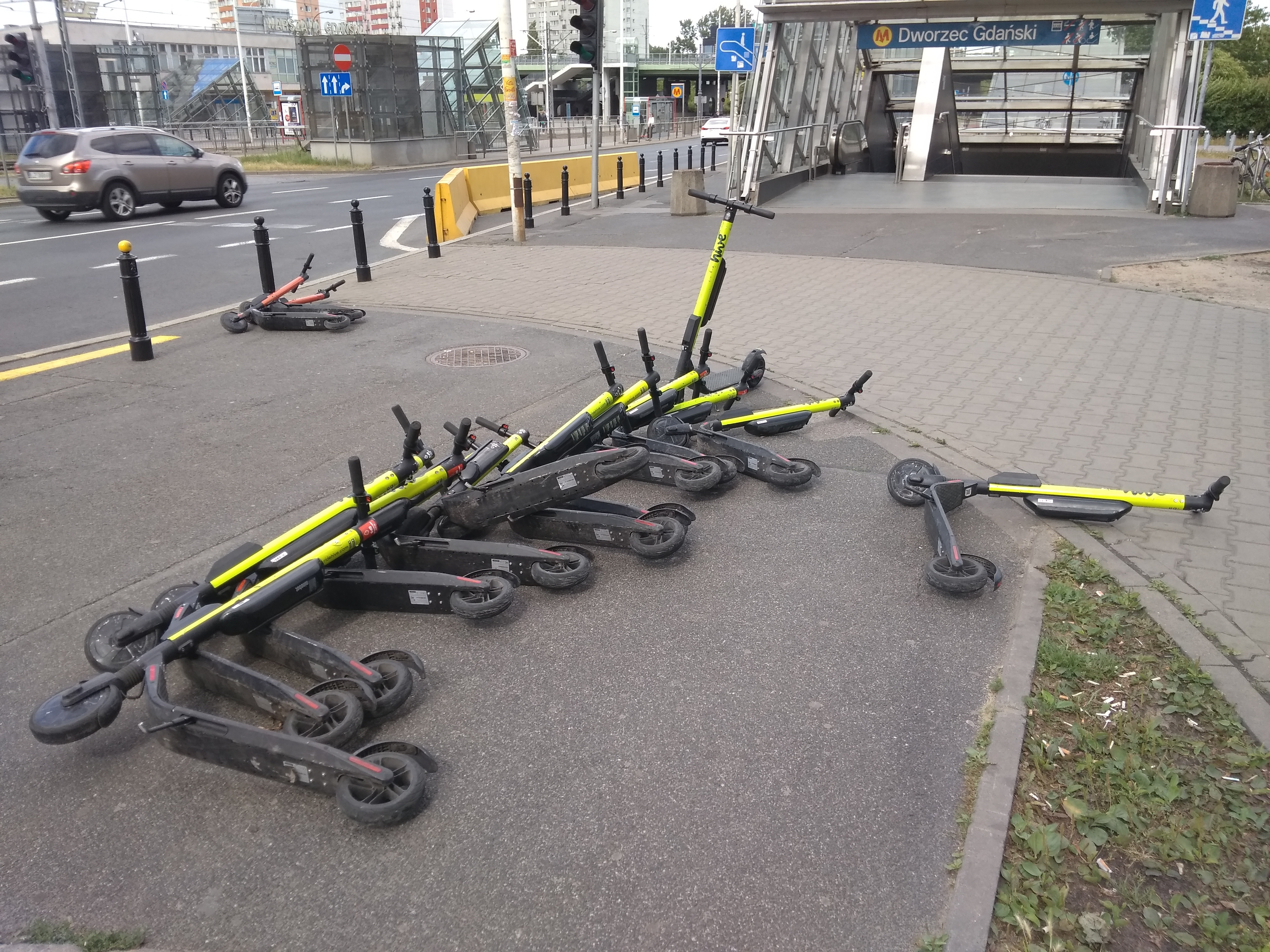 Poprzewracane hulajnogi elektryczne koło Dworca Gdańskiego w Warszawie, głównie Hive, w oddali CityBee.